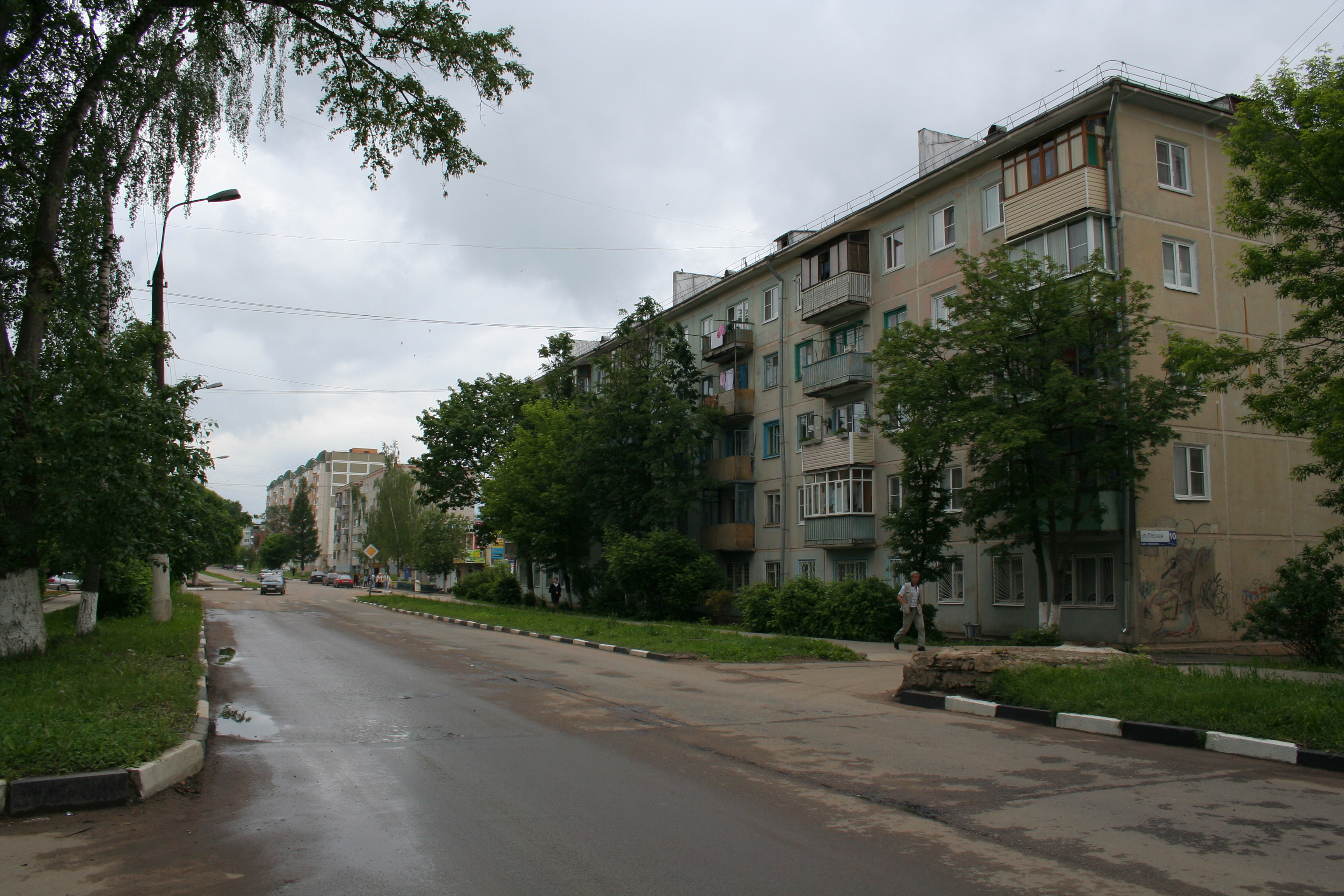 Stadt Balabanowo, Oblast Kaluga, Russland. Lesnaja-Straße, Wohnhäuser